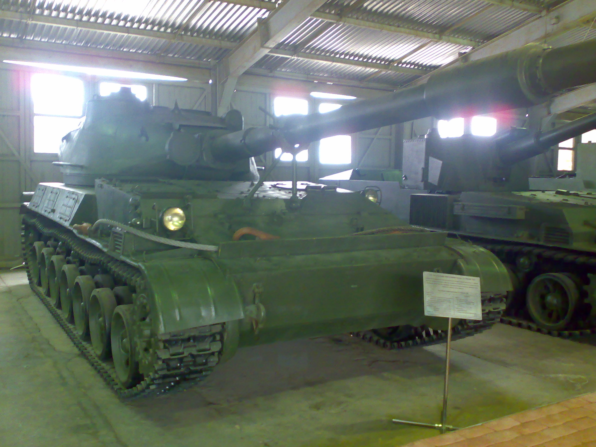 Опытная САУ СУ-152 "Таран" в Бронетанковом музее Кубинки.